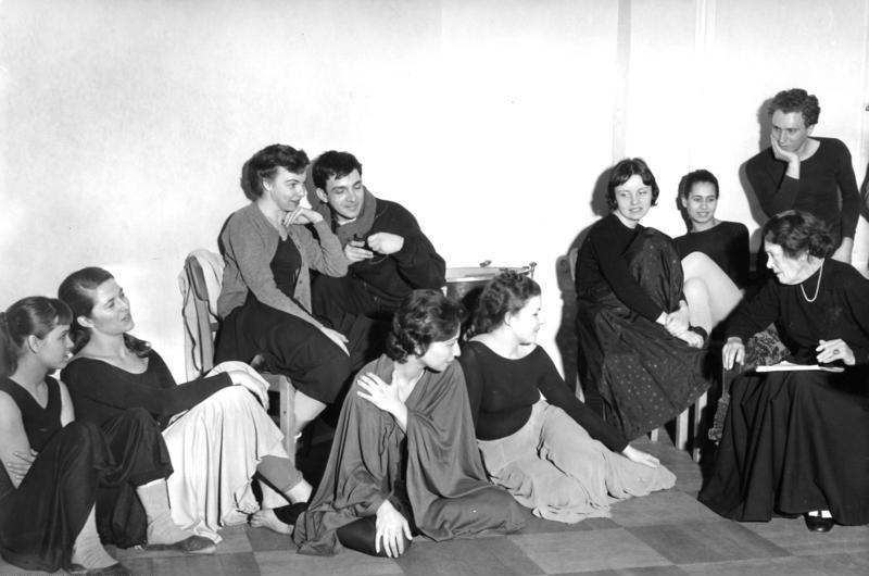 23.1.1959 West-Berlin Mary Wigman-Studio, Theoretischer Unterricht rechts: M. Wigman